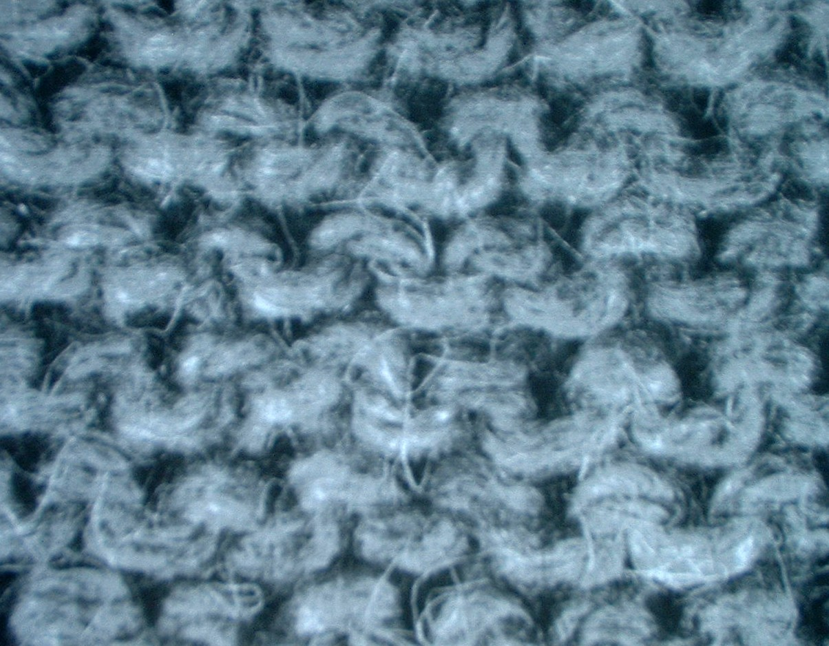 Glatte LL-Bindung im Gestrick